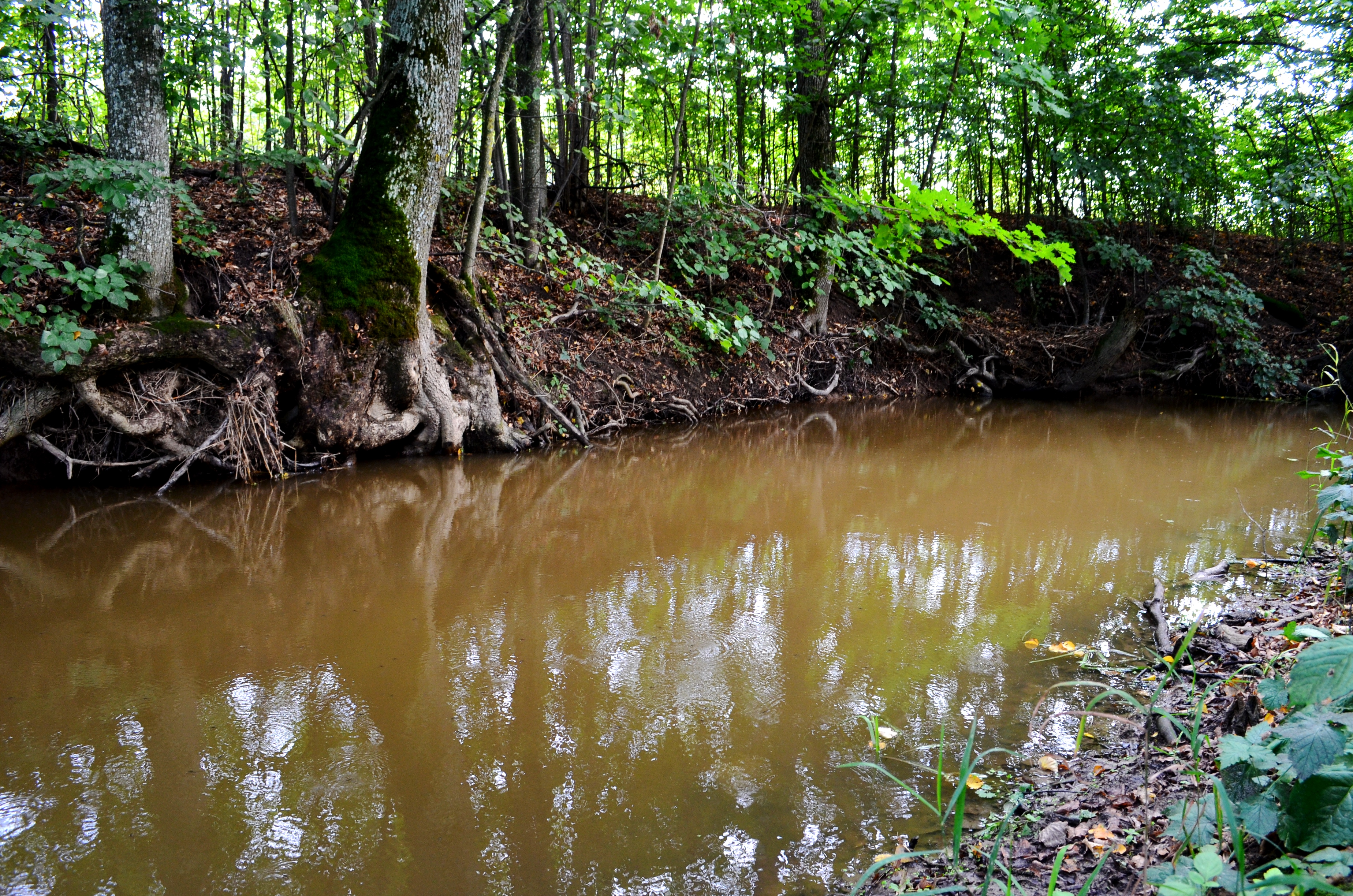 Rausvė ties Nadrausve, Vilkaviškio raj.